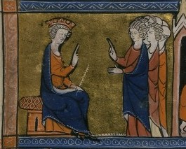 Conseil présidé par Baudouin II